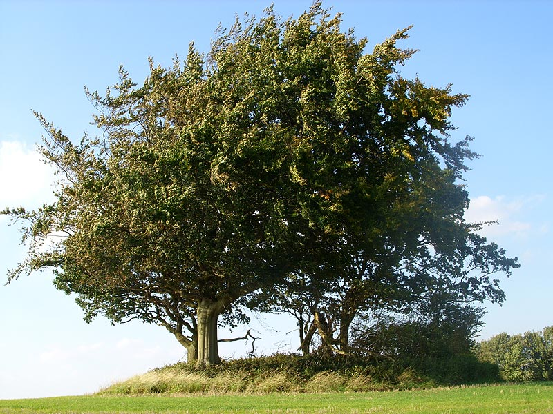 Langbetten von Rothensande